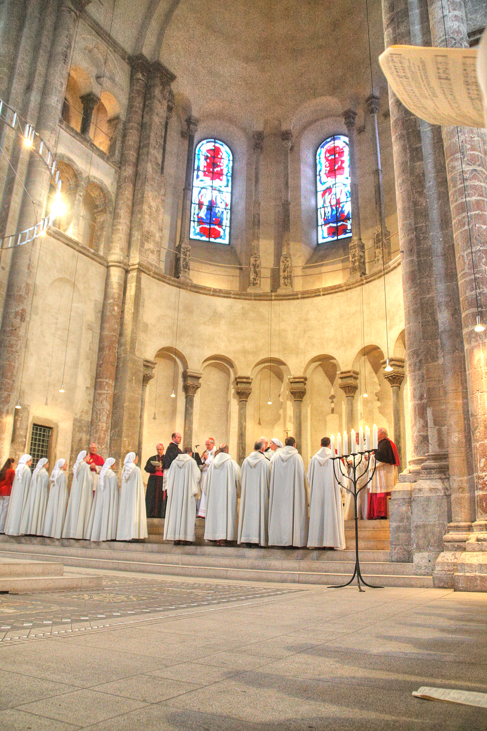 Segnung der Mitglieder der neugegründeten Filiale der Gemeinschaft von Jerusalem in der Kirche Groß St. Martin in Köln durch Joachim Kardinal Meisner